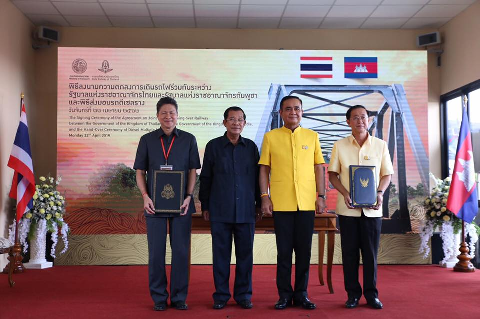 พิธีเปิดสถานีรถไฟด่านพรมแดนบ้านคลองลึก ขณะลงนามข้อตลง